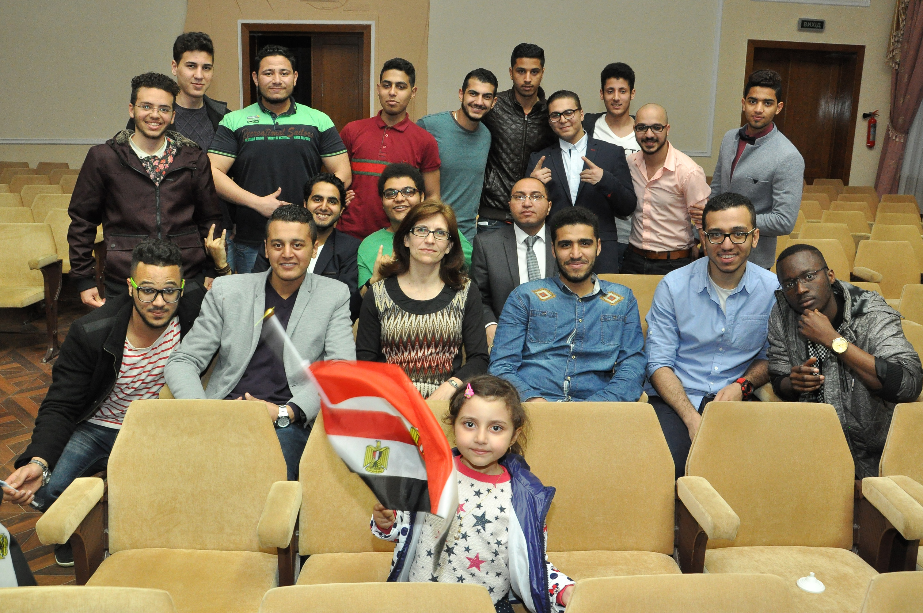 Літературно-музичне свято «Мова єднає нас», зорганізоване слухачами підготовчого відділення факультету іноземних студентів ТДМУ. Студенти з Єгипту.